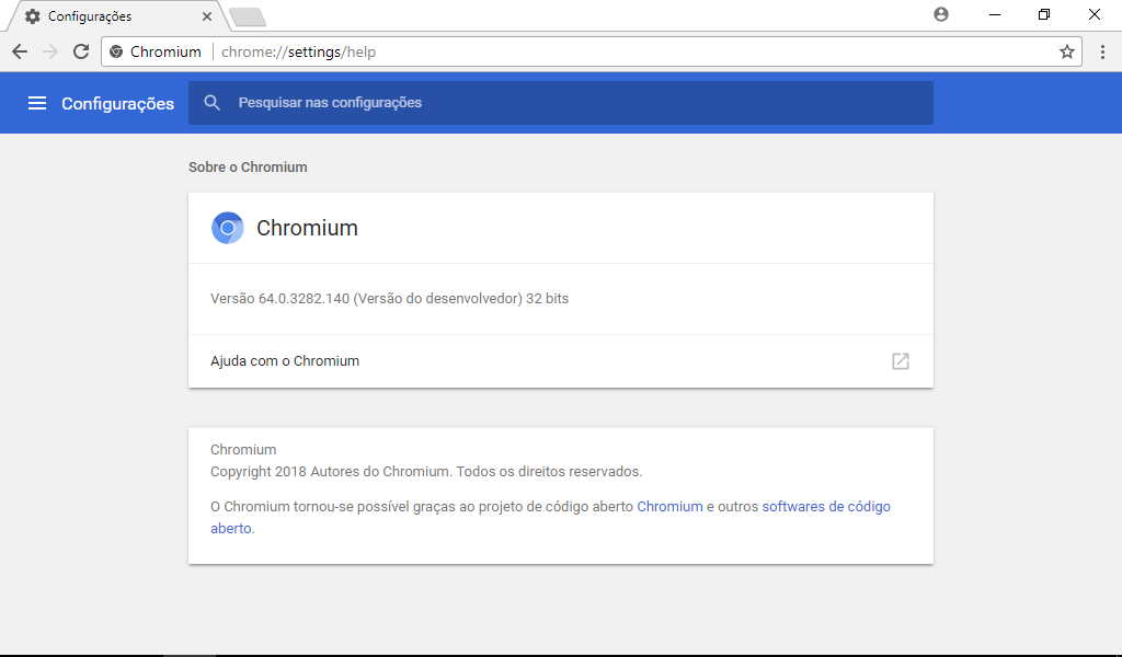 Captura de tela do navegador web Chromium versão 64.0.3282.140 rodando no Windows 10.